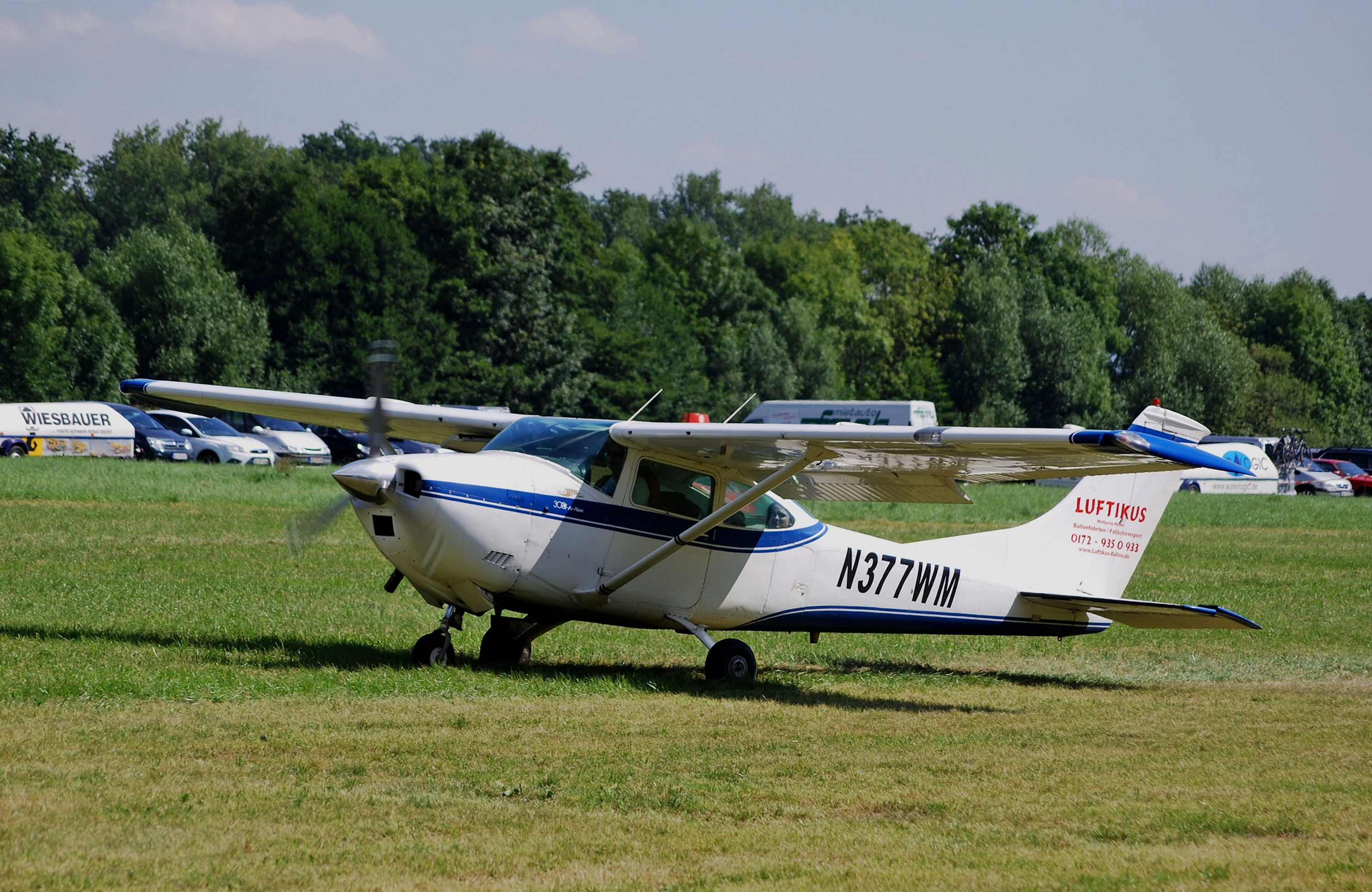 Eine Cessna 182N Skylane in Löchgau, Baden-Württemberg.